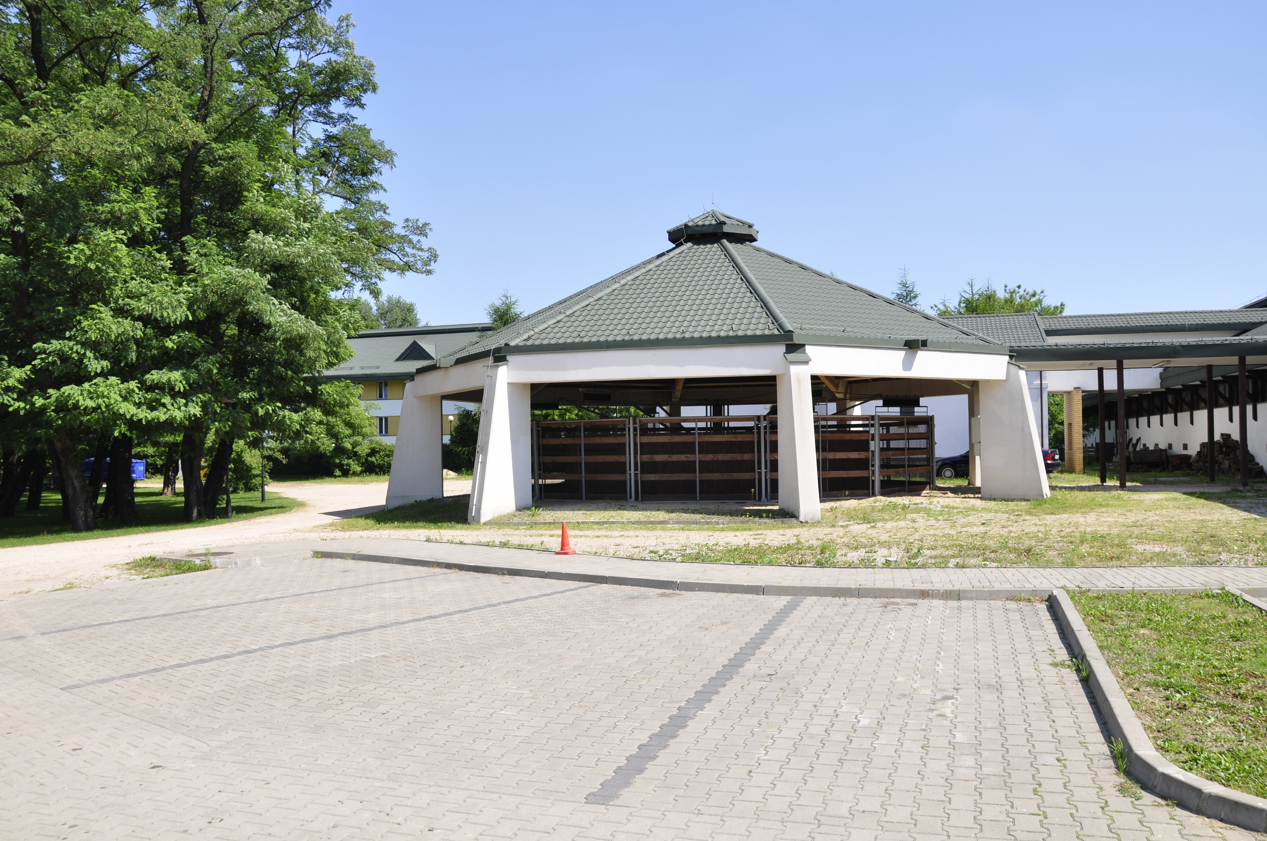 Warschau Ursynow, SGGW, Pferdeklinik